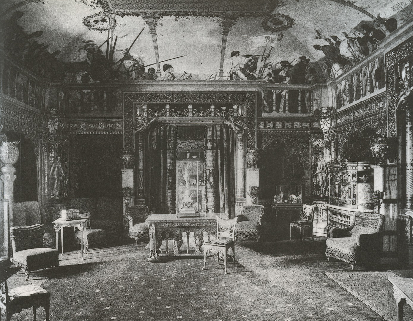 "Mr. William H. Vanderbilt's Drawing-Room."